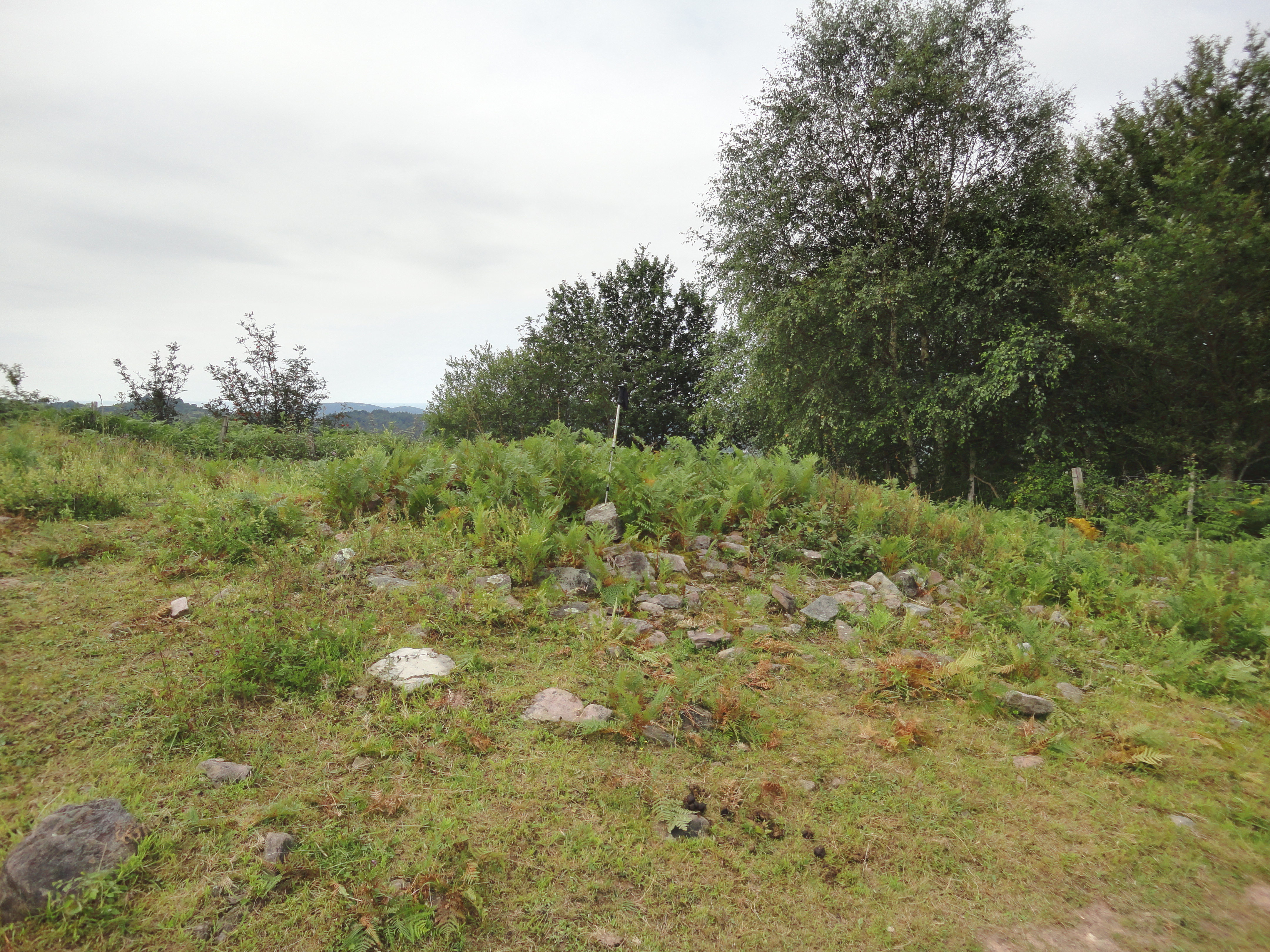 Igoingo lepua II trikuharria